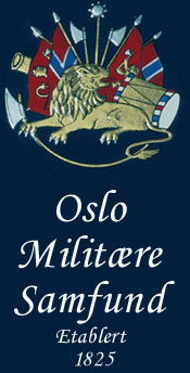 Logoen til foreningen Oslo Militære Samfund.